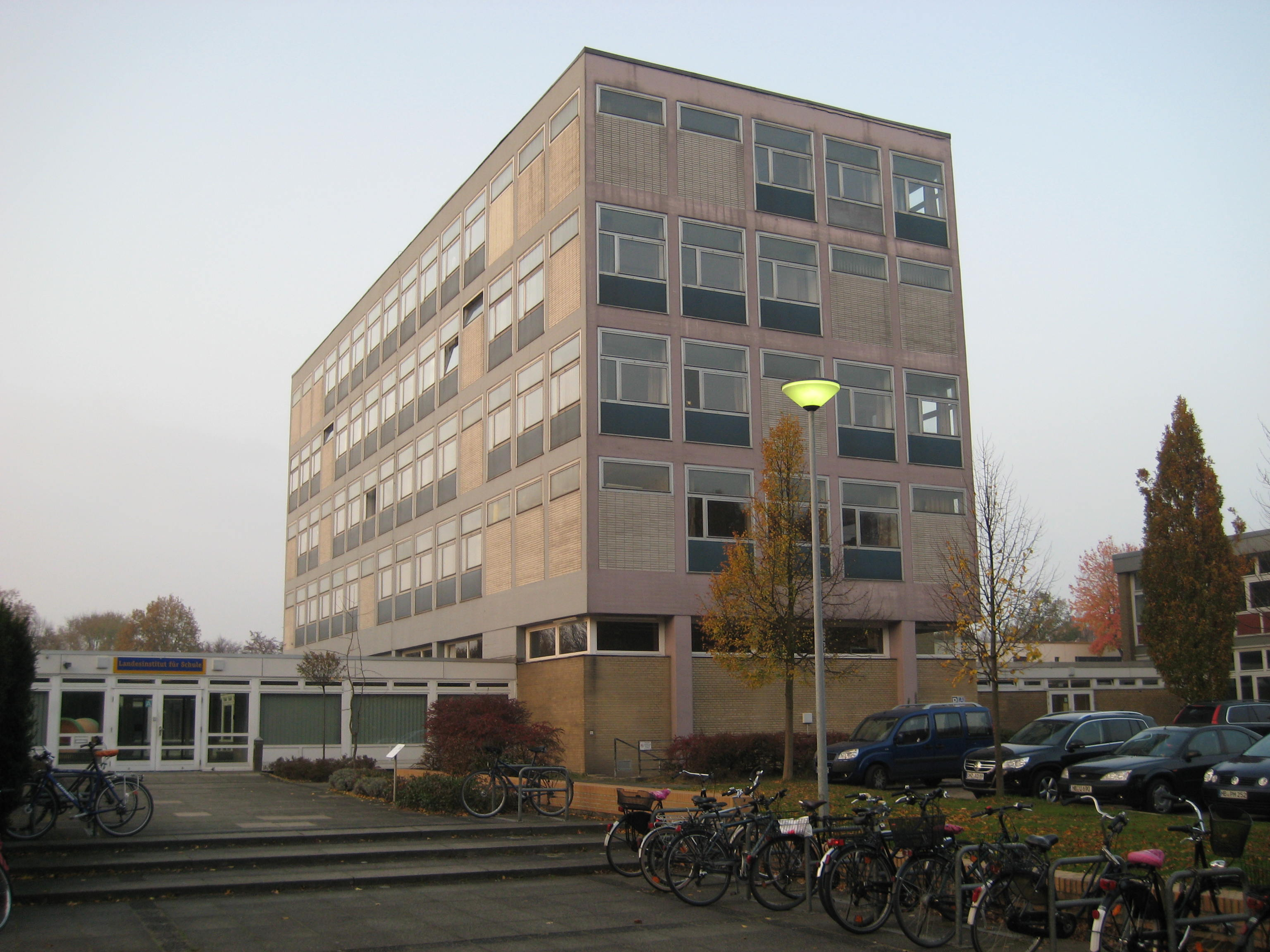 Landesinstitut für Schule (LIS) der Freien Hansestadt Bremen – Haupsitz des LIS in Bremen-Findorff, Am Weidedamm.